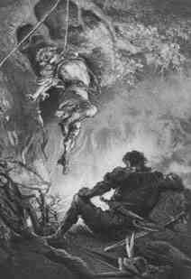 Ilustracja Starej baśni Józefa Ignacego Kraszewskiego, rysunek autorstwa Michała Elwiro Andriolliego. "Ogień [...] podkładając, aby Hengo upiekł mu się żywcem."